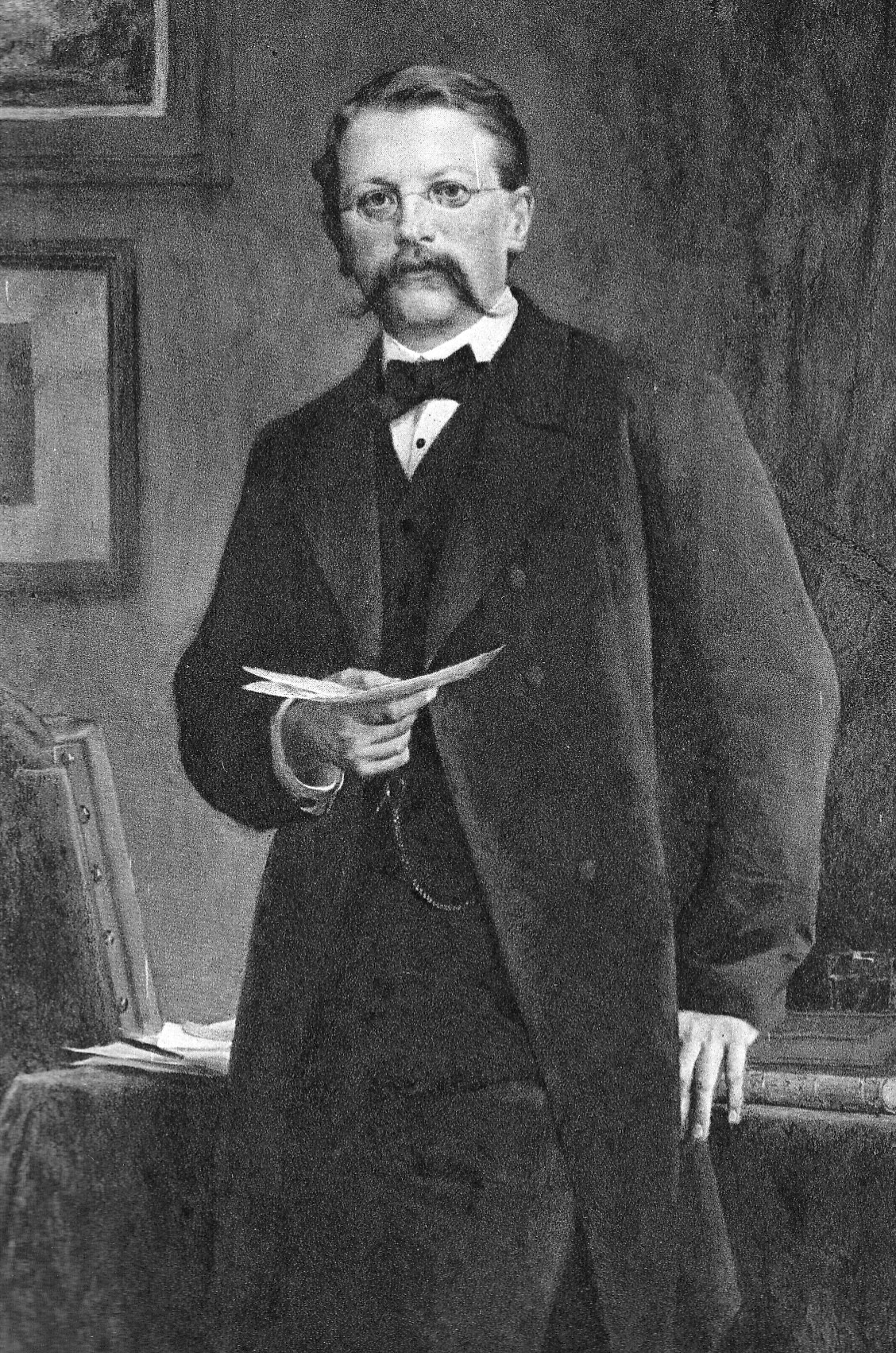 Portrait von Carl Wilhelm Zanders